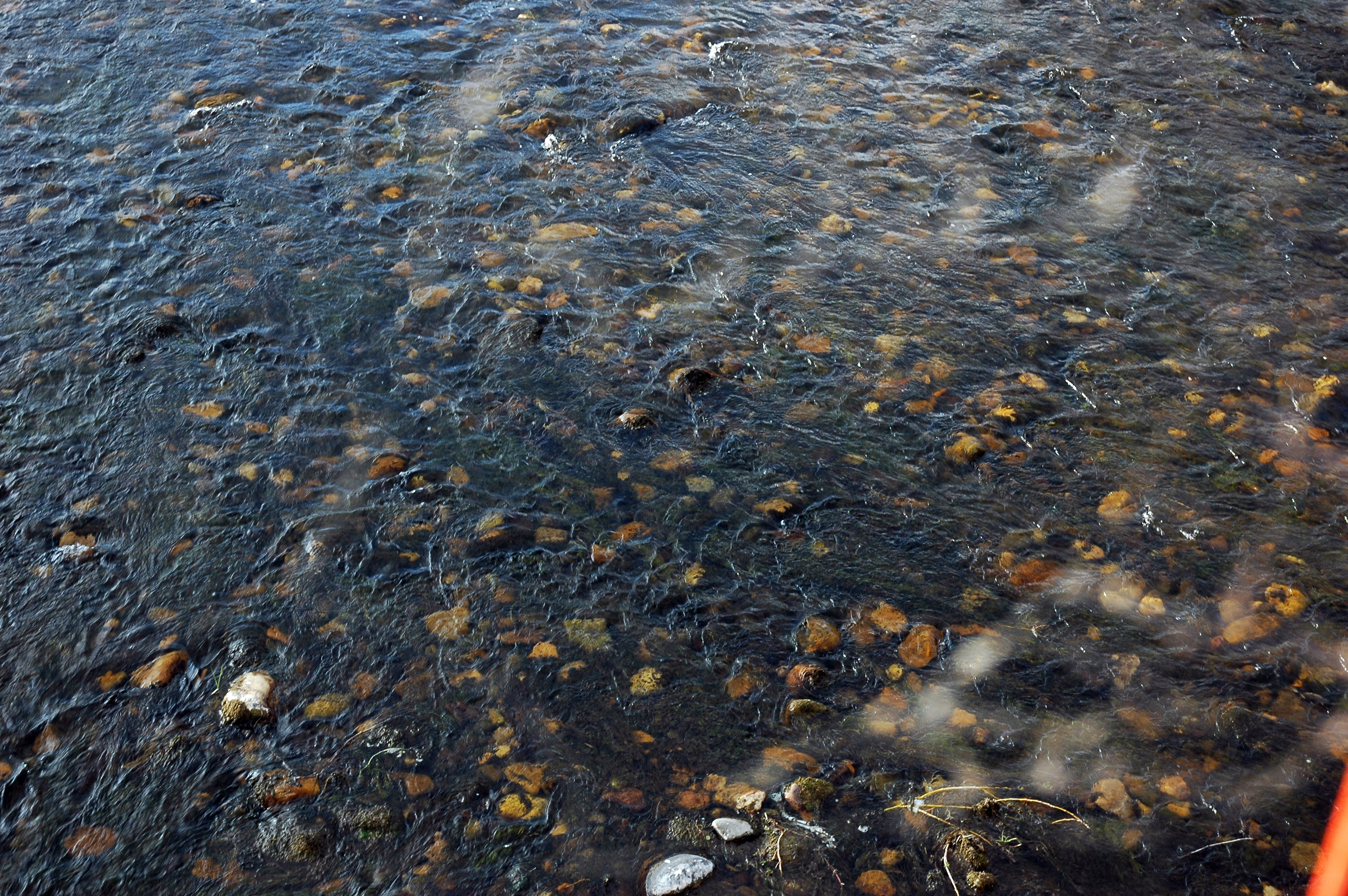 Cantos rodados en el Rio Luna, Leon, España